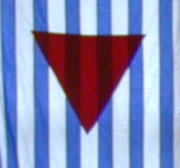 Logo VVN